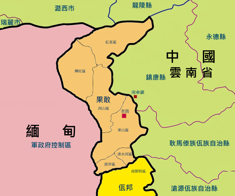 緬甸撣邦第一特區(果敢)